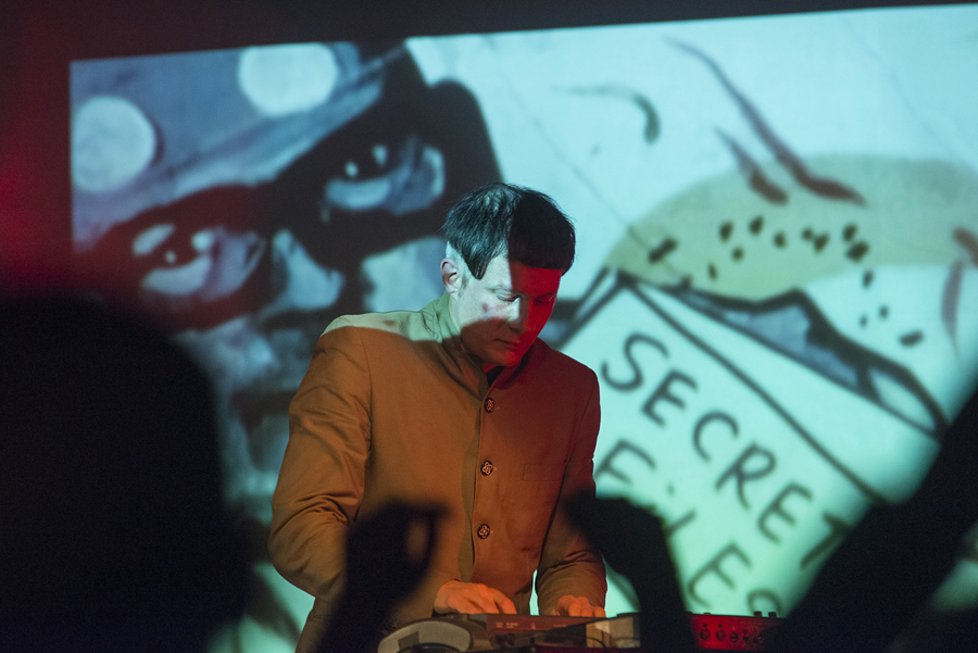 Phénomena 2012, Felix Kubin, performance à la Sala Rossa @ Caroline Hayeur